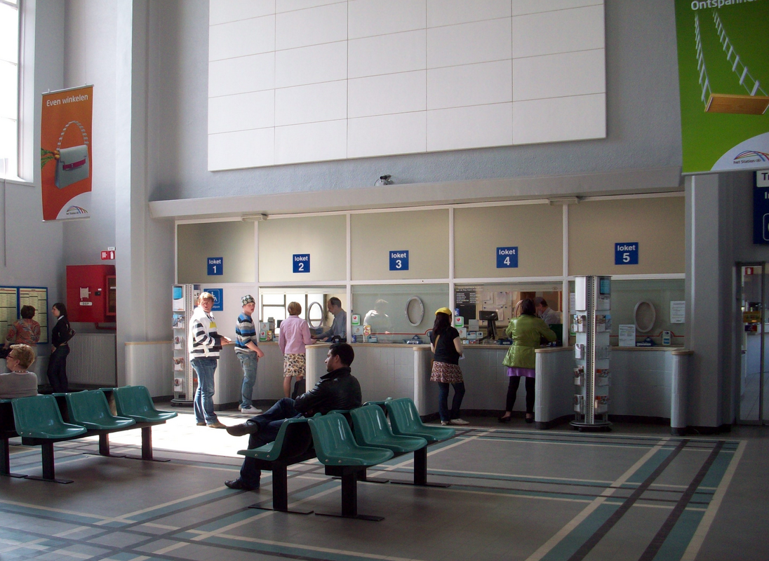 Station Kortrijk